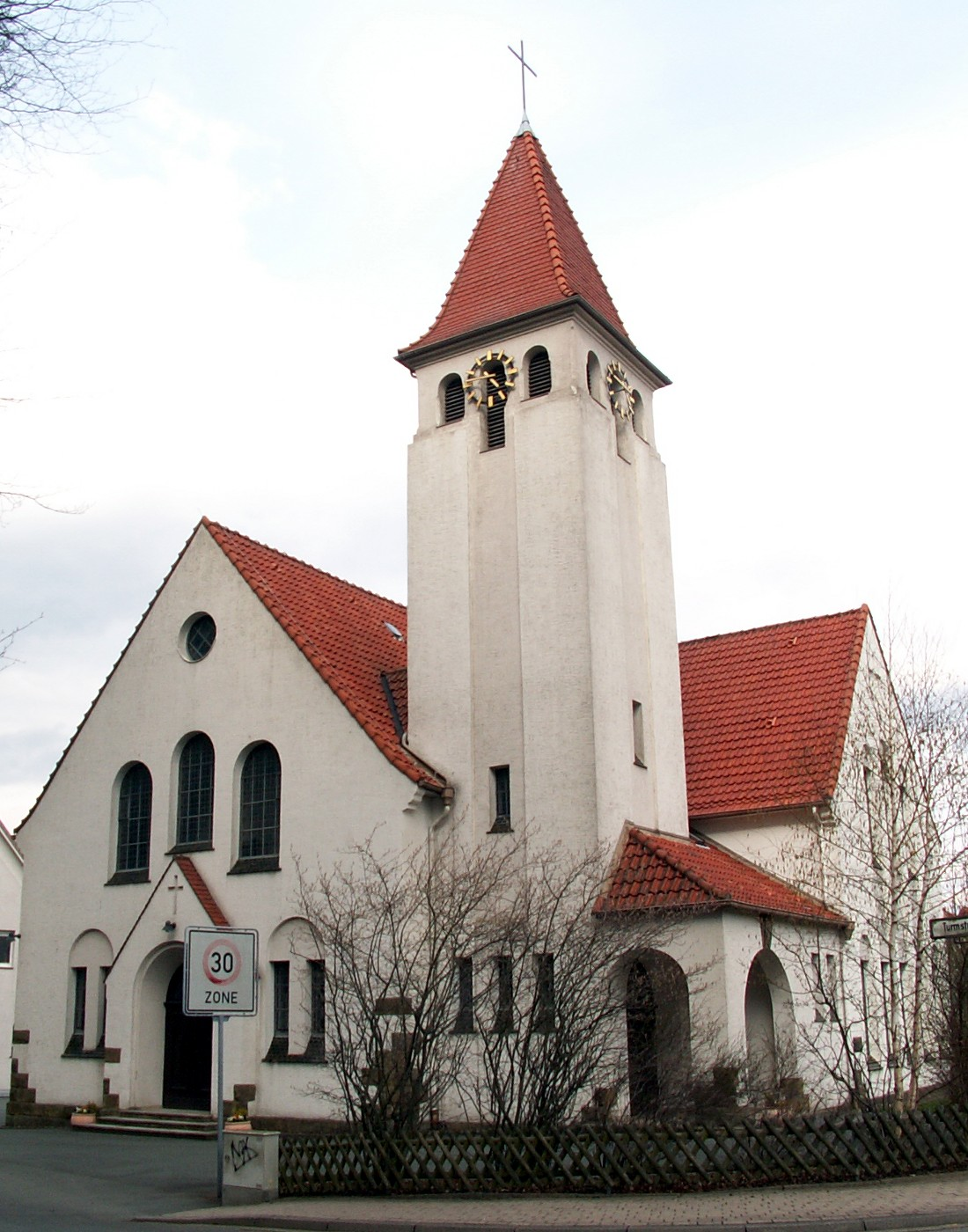 Friedenskirche in Elverdissen, Stadt Herford, Ansicht von Südwesten